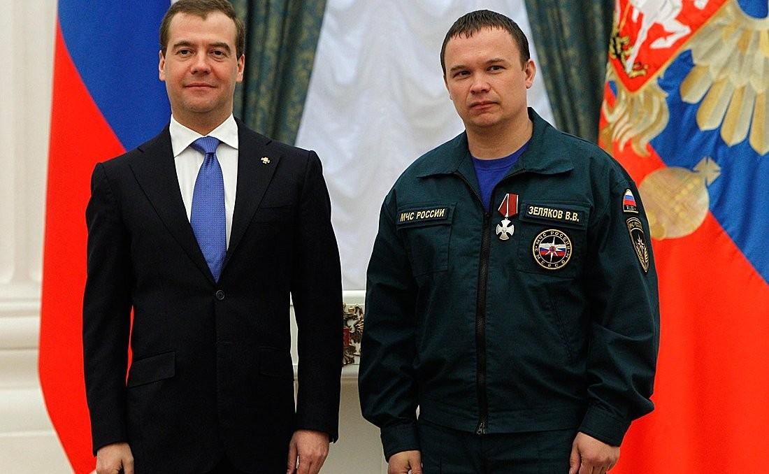 Вручение государственных наград. Орденом Мужества награждён командир отделения горноспасательного отряда Военизированной горноспасательной части Валерий Зеляков.